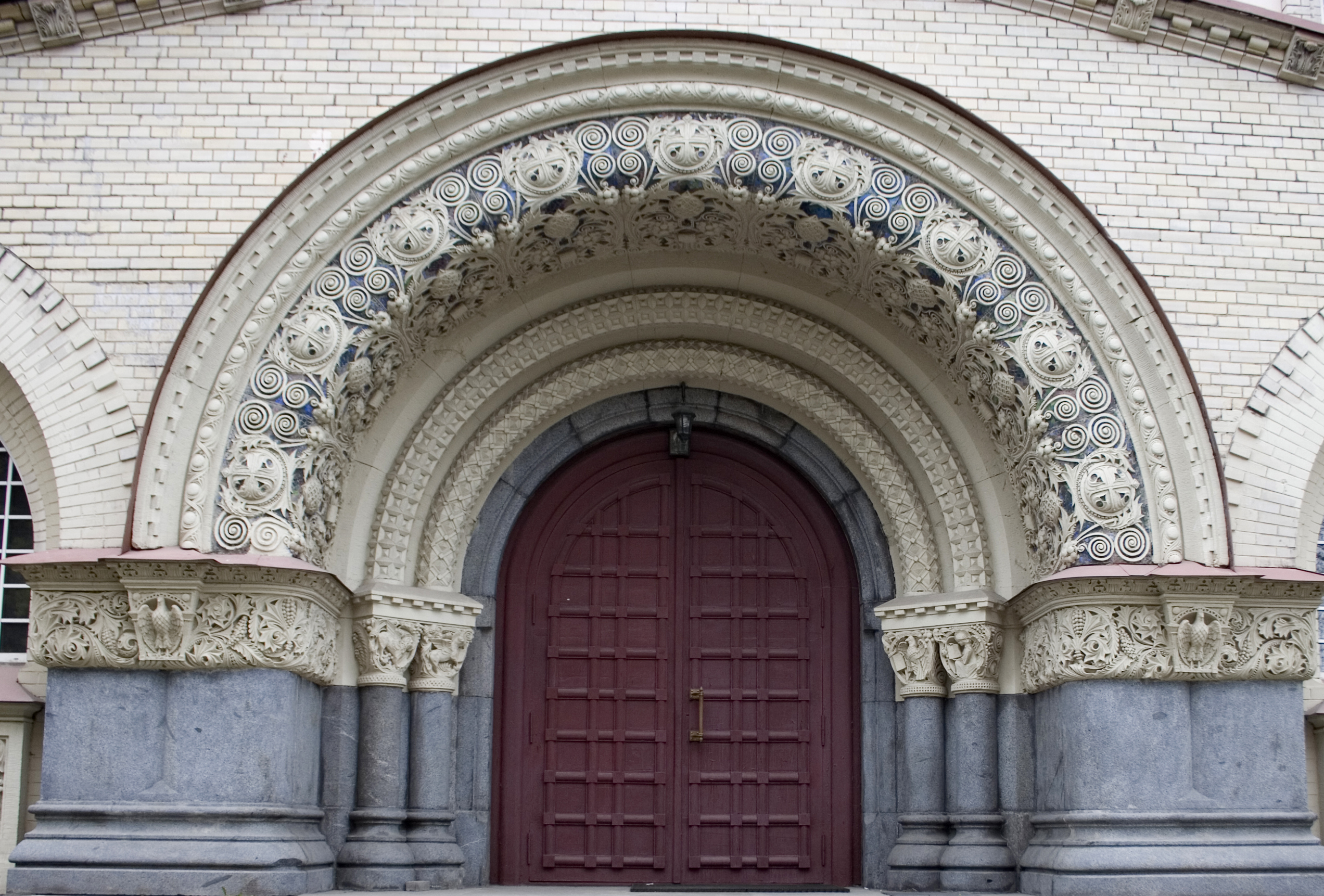 Казанская церковь в Новодевичьем монастыре